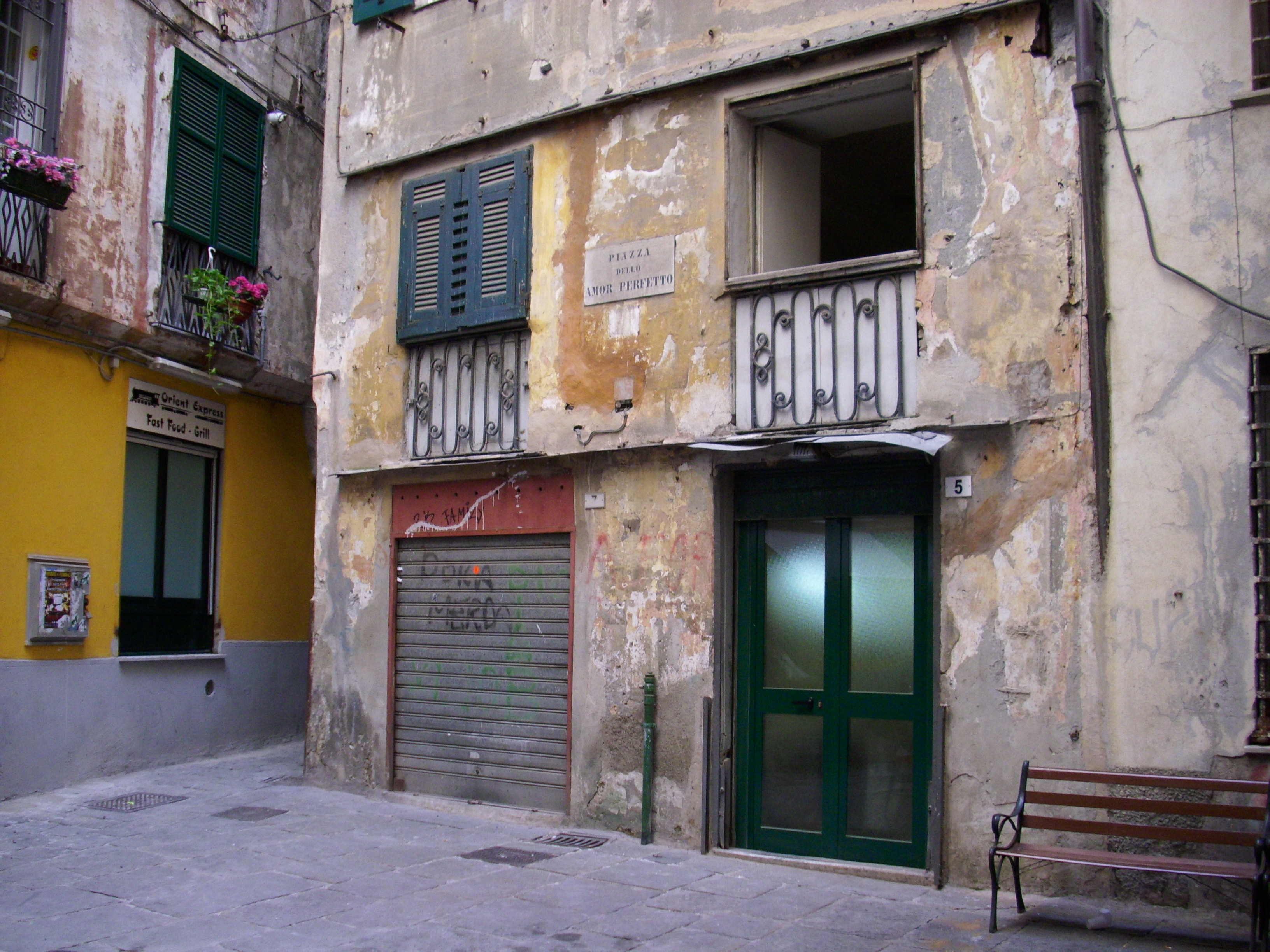 Piazza dell'Amor Perfetto, nel centro storico di Genova